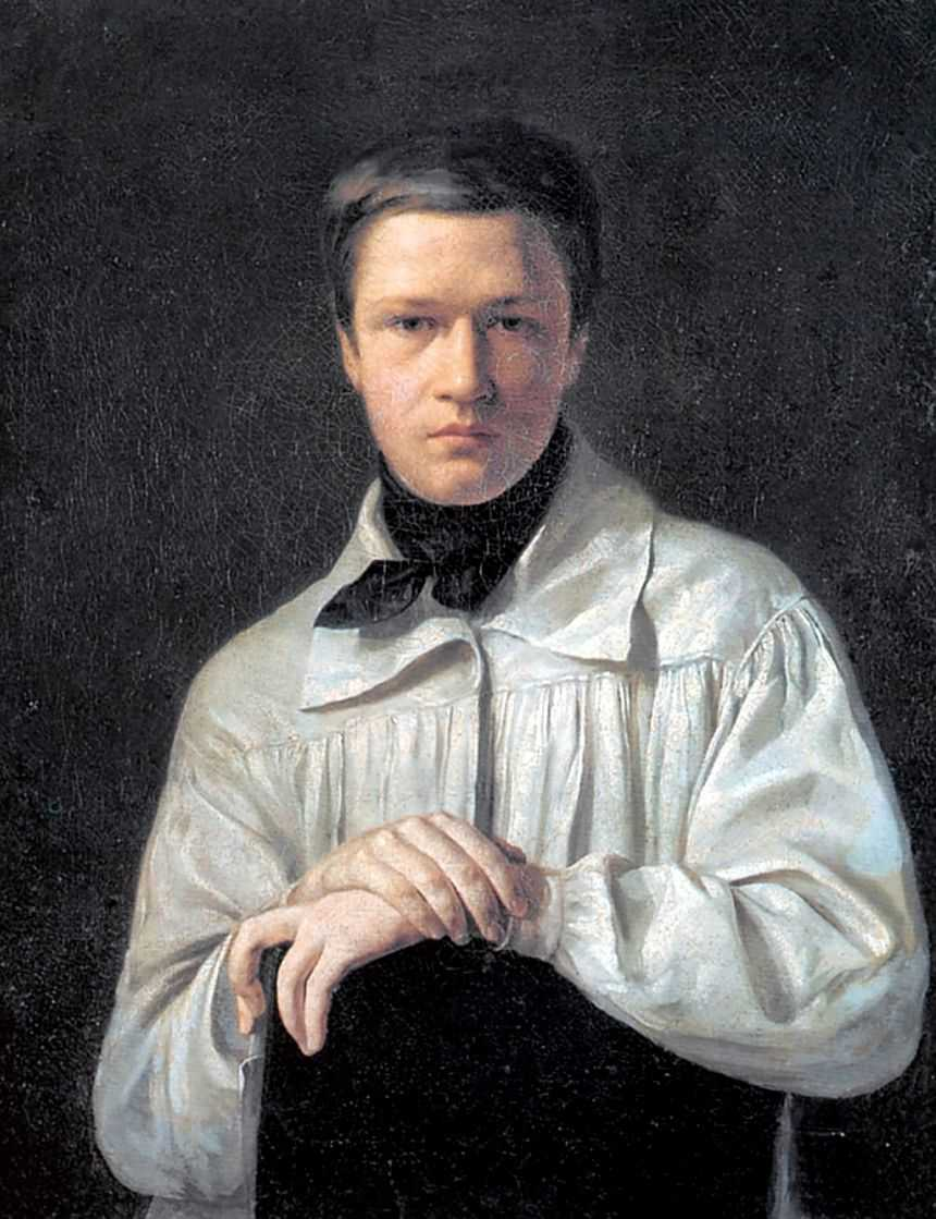 Тыранов Алексей Васильевич. Автопортрет. 1825